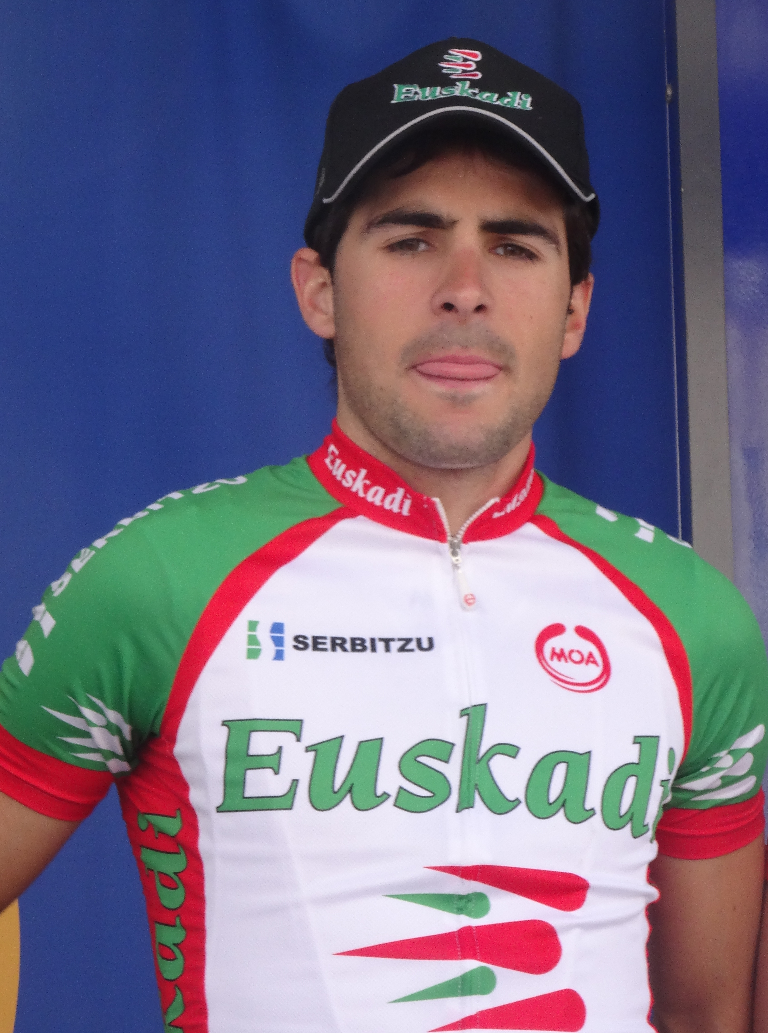 Reportage photographique réalisé le dimanche 25 mai 2014 à l'occasion du départ et de l'arrivée de la troisième étape du Paris-Arras Tour 2014 à Arras, Pas-de-Calais, Nord-Pas-de-Calais, France. Depicted person: Jon Aberasturi Depicted team: Euskadi